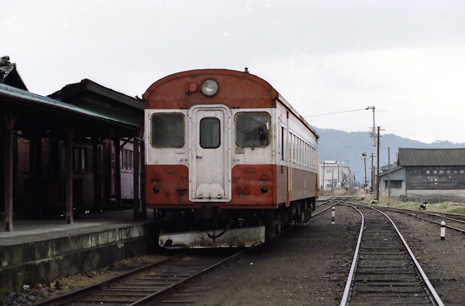 加悦駅に停車中のキハ08